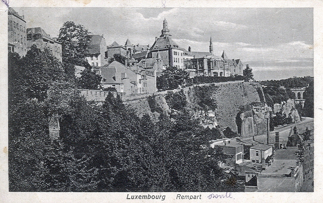 Feldpostkarte vom 16.12.1917. Beschriftung: Luxembourg - Remparts